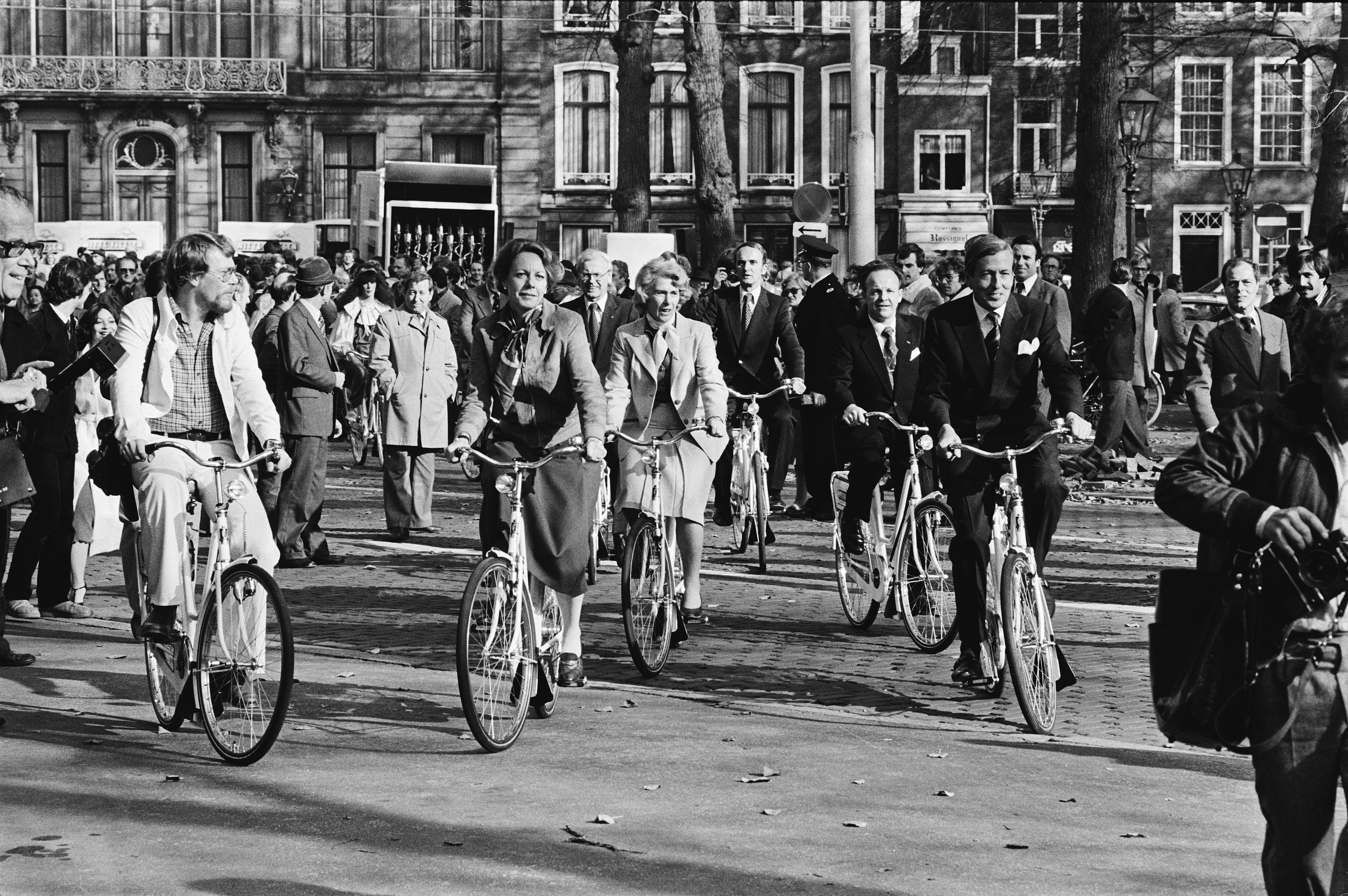 Collectie / Archief : Fotocollectie Anefo Reportage / Serie : Prins Claus aanwezig bij de introductie van het "Witte Fietsenwagenplan" van de ANWB en de Nederlandse Hartstichting Beschrijving : Prins Claus op de fiets, links staatssecretaris Smit Kroes (Verkeer en Waterstaat), tweede van links minister Gardeniers (Cultuur, Recreatie en Maatschappelijk Werk) Datum : 25 oktober 1979 Locatie : Den Haag, Zuid-Holland Trefwoorden : fietsen, ministers, prinsen, staatssecretarissen, straatbeelden Persoonsnaam : Bernhard (prins Nederland), Claus, prins, Gardeniers-Berendsen, Til, Smit-Kroes, Neelie Fotograaf : Suyk, Koen / Anefo Auteursrechthebbende : Nationaal Archief Materiaalsoort : Negatief (zwart/wit) Nummer archiefinventaris : bekijk toegang 2.24.01.05 Bestanddeelnummer : 930-5104